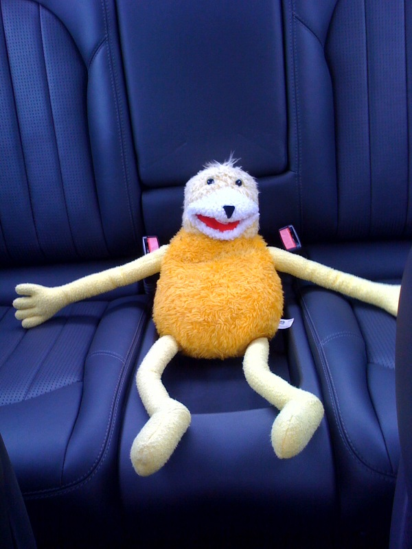 Flat Eric